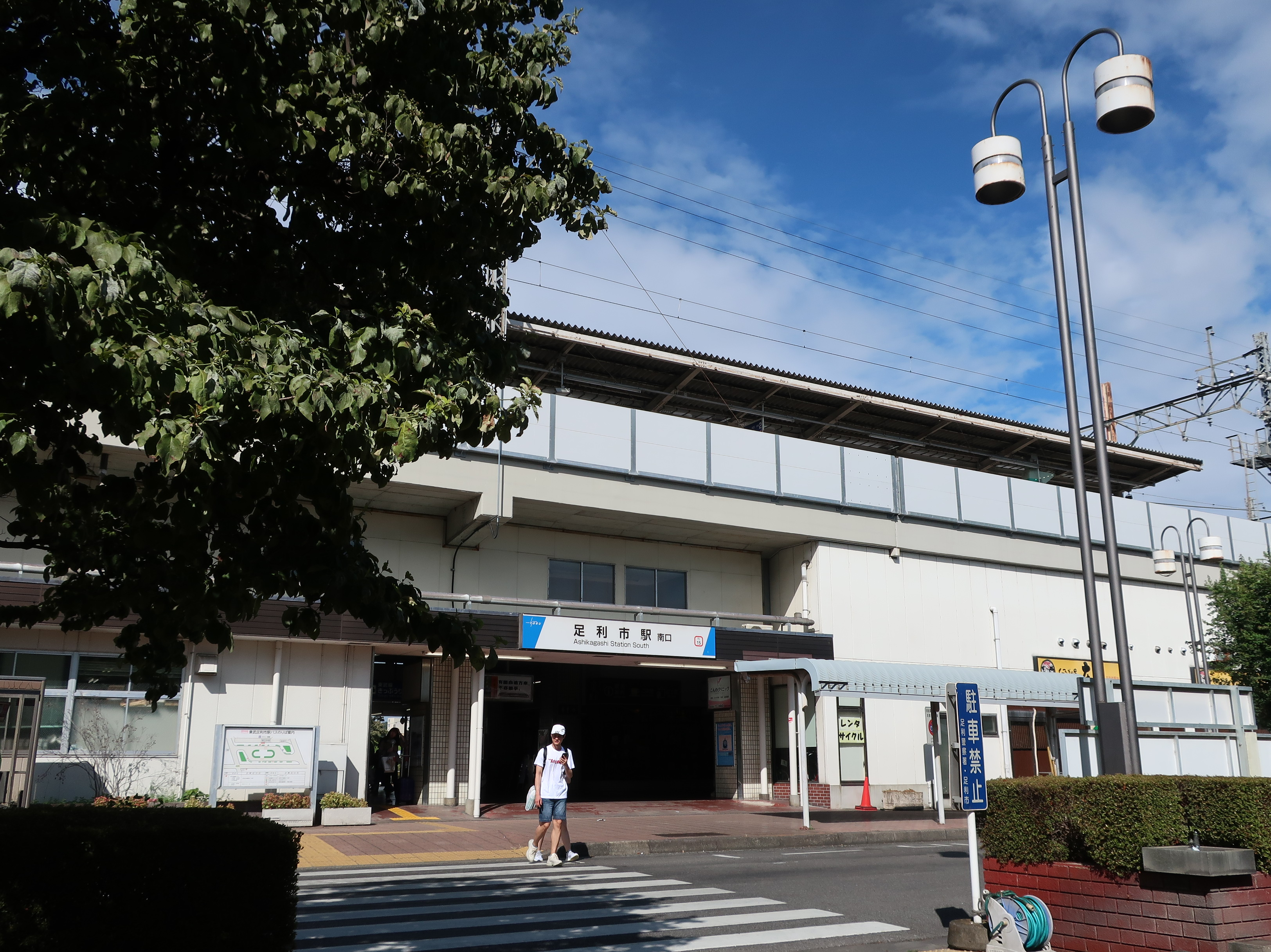 東武足利市駅南口